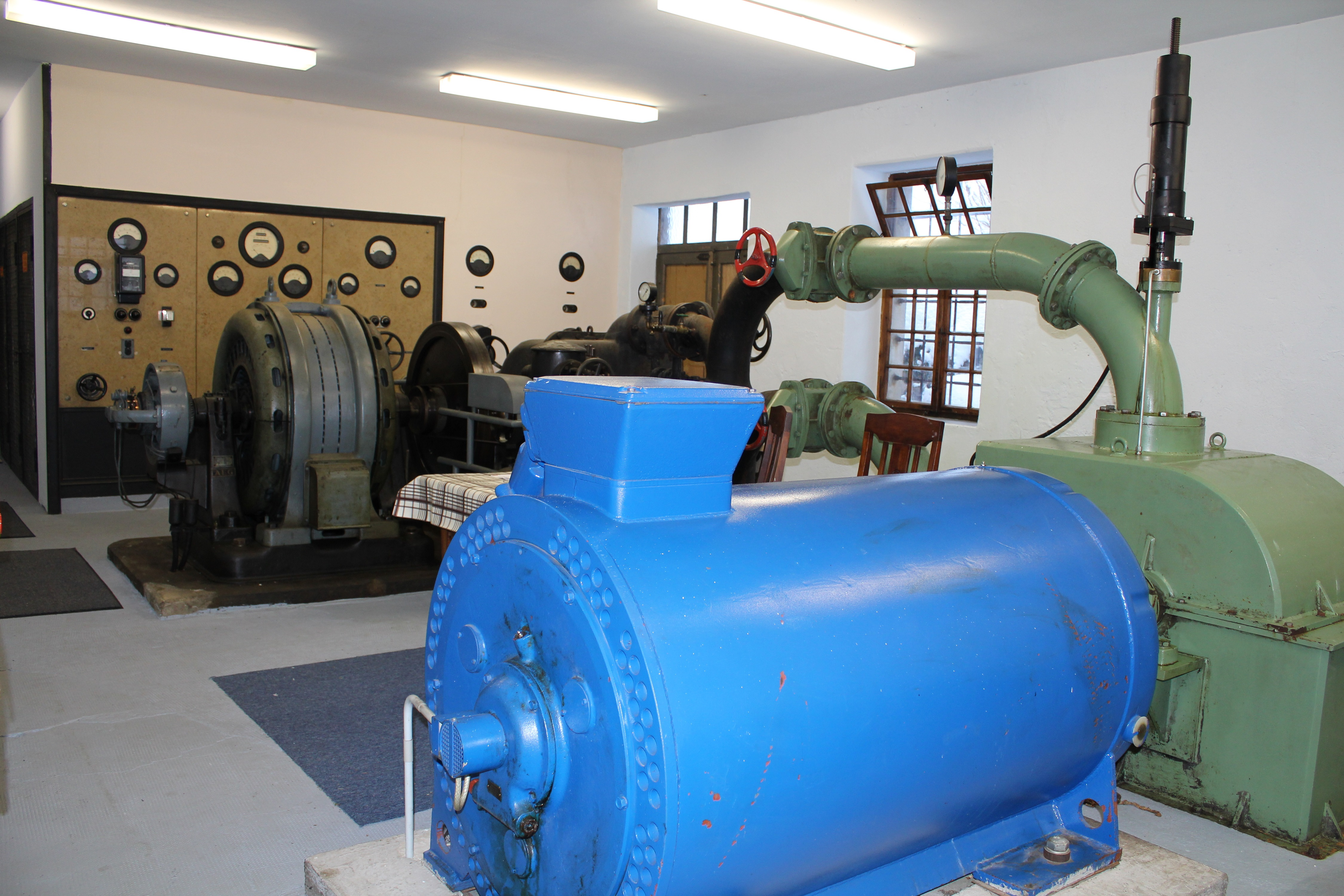 Peltonturbine mit Generator im E-Werk Wacht (am Prägbach im Todtnauer Ortsteil Präg).